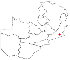 Lage von Katete in Sambia